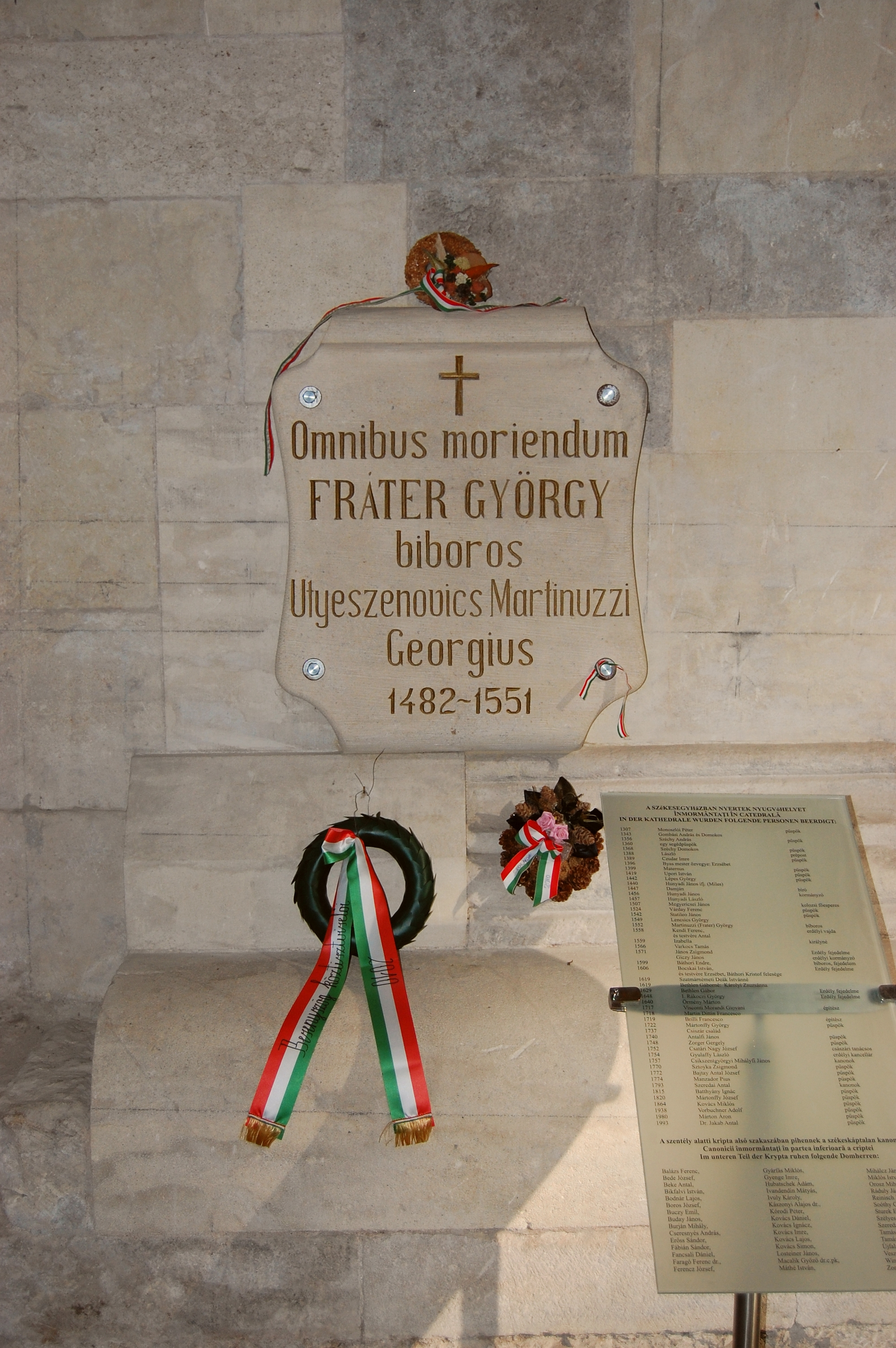 Gyulafehérvár, Szent Mihály Székesegyház - Martinuzzi Fráter György síremléke